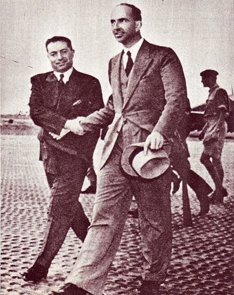 Umberto II a Ciampino verso l'esilio